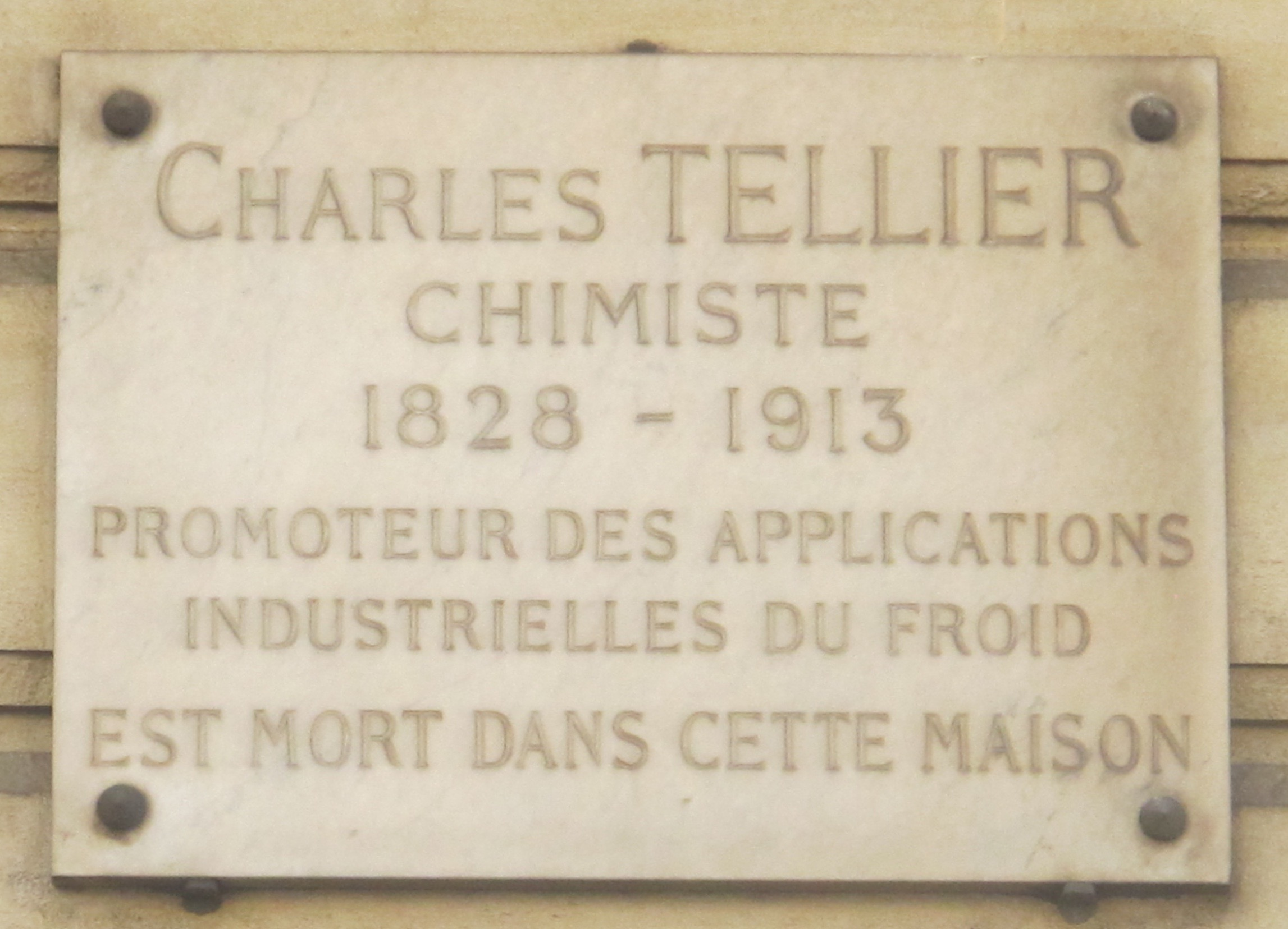 Plaque en hommage à Charles Tellier, 75 rue d'Auteuil (Paris, 16e).